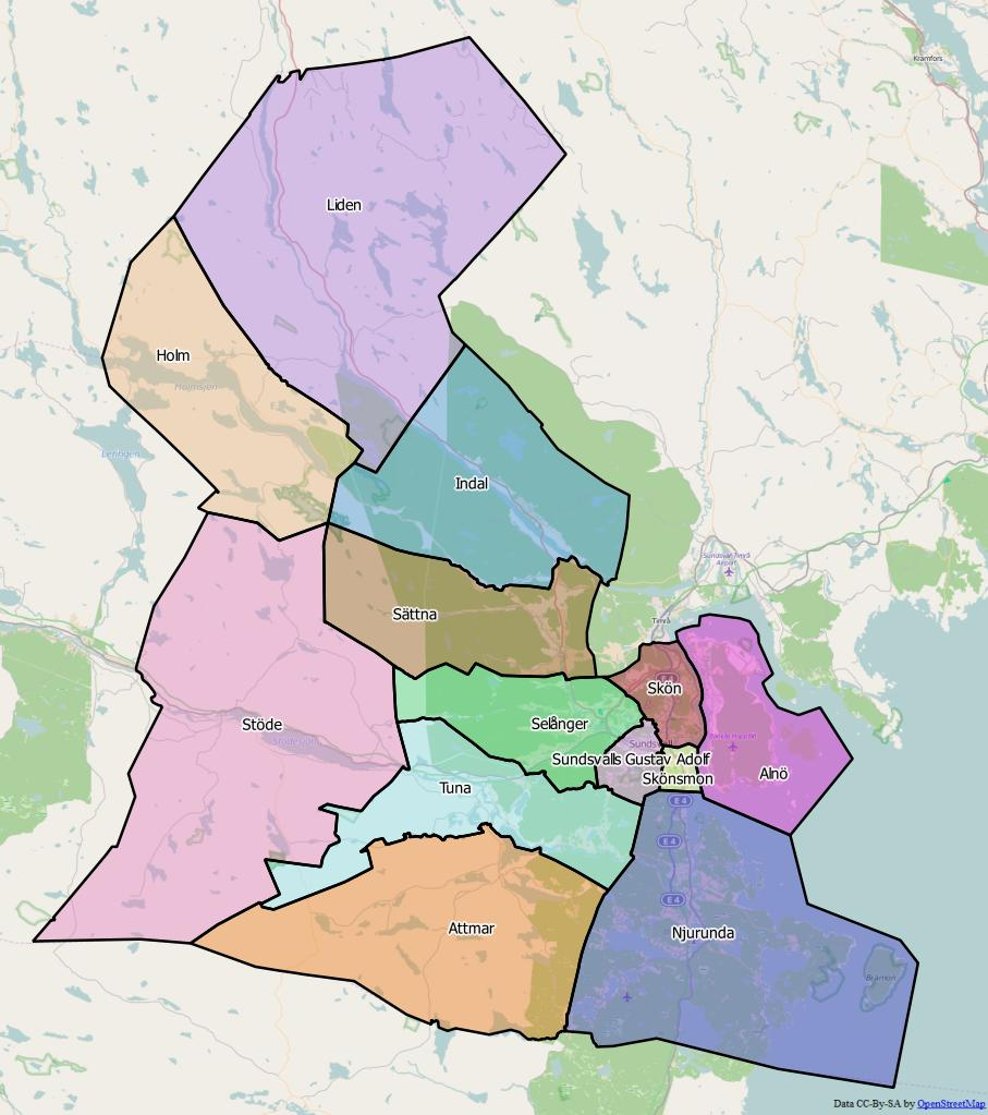 Distriktsindelningen i Sundsvalls kommun World file: 207.70598810367496867 0 0 -207.70598810367496867 1802916.24852014100179076 9094253.29491178132593632